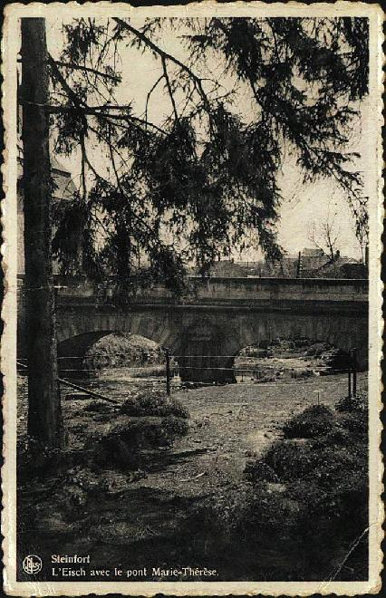 Luxembourg, Steinfort. L'Eisch avec pont Marie-Thérèse, vers 1920.